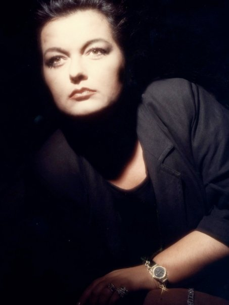 Patrizia Suzzi negli anni '90